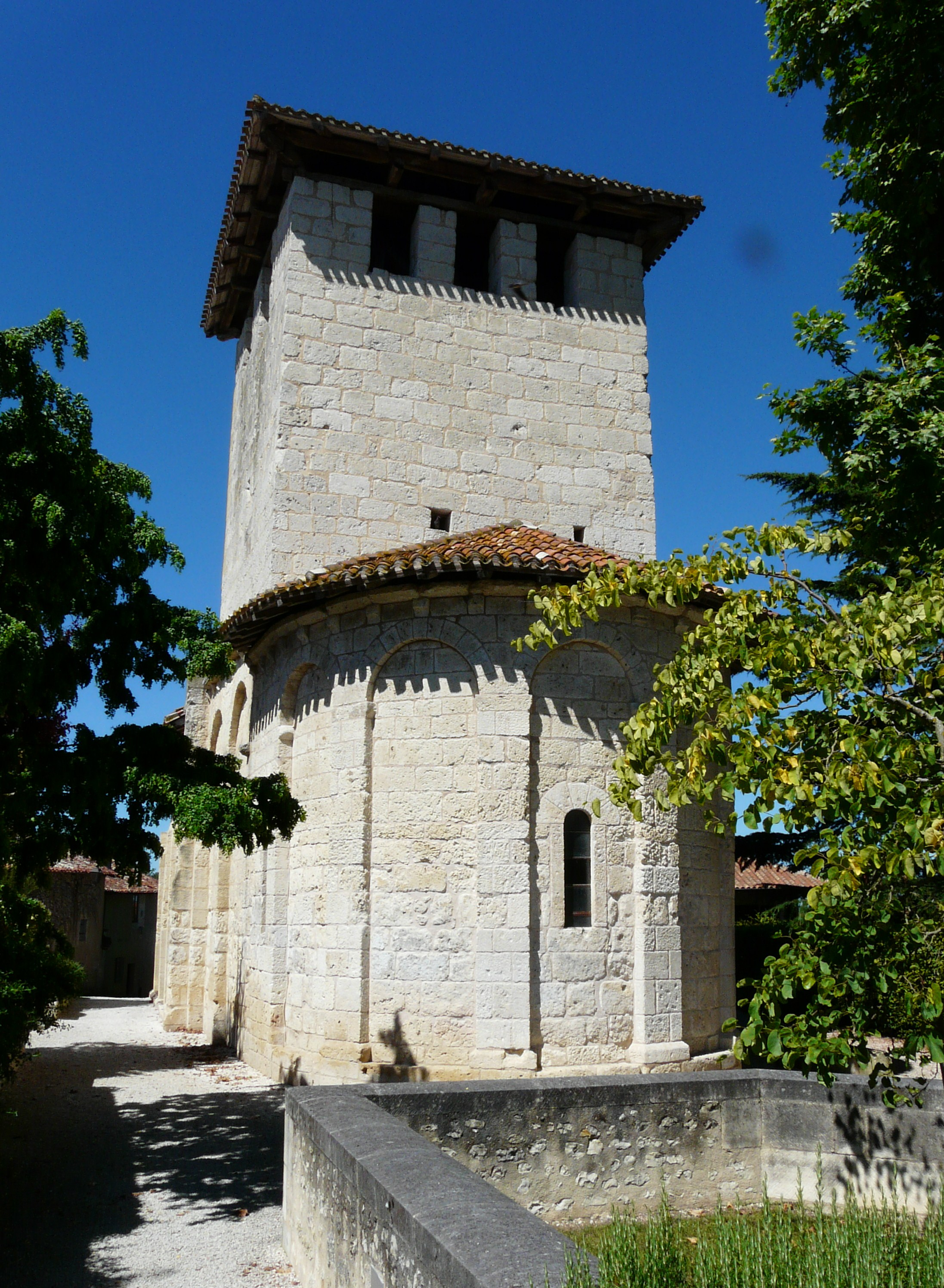 Le chevet de l'église Saint-Pierre de Faye, Ribérac, Dordogne, France Object location45° 15′ 10″ N, 0° 19′ 15.2″ E